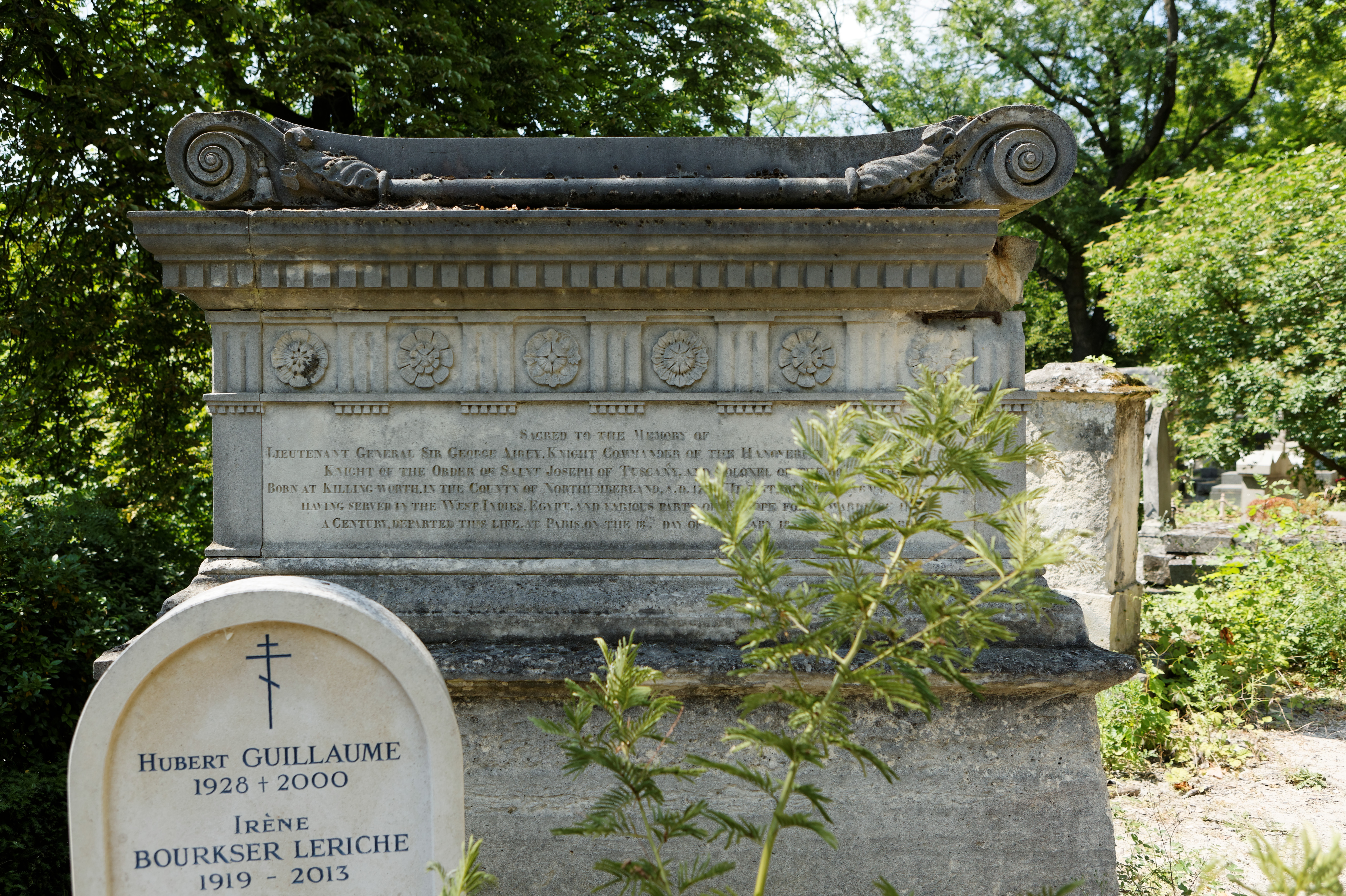 Sépulture de George Airey (1761-1833), lieutenant général britannique.